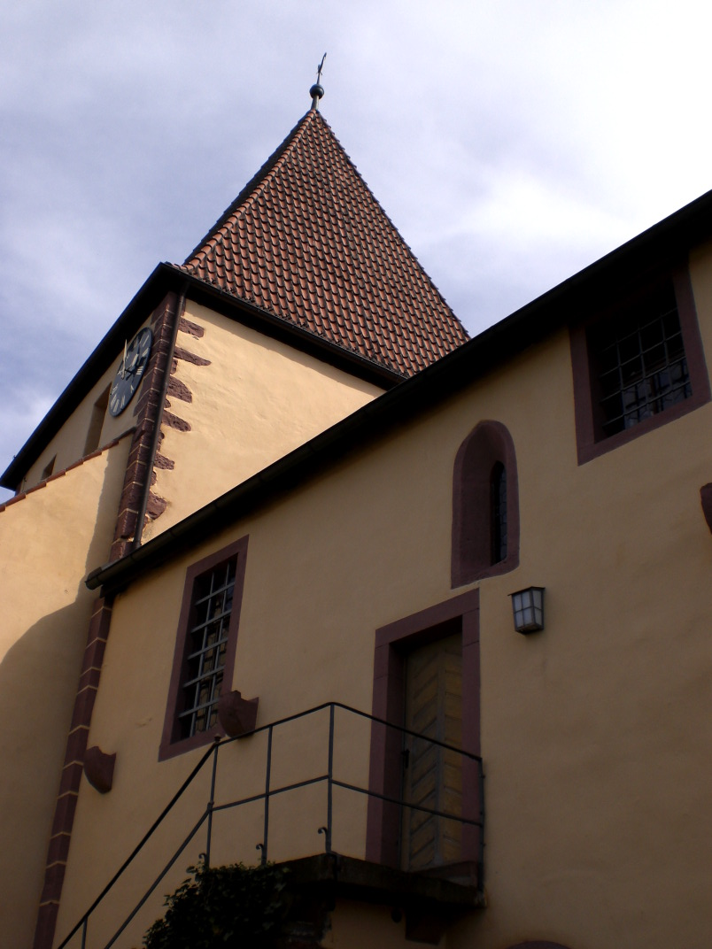 Wehrkirche im Ortsteil Urphar, Stadt Wertheim, Baden-Württemberg